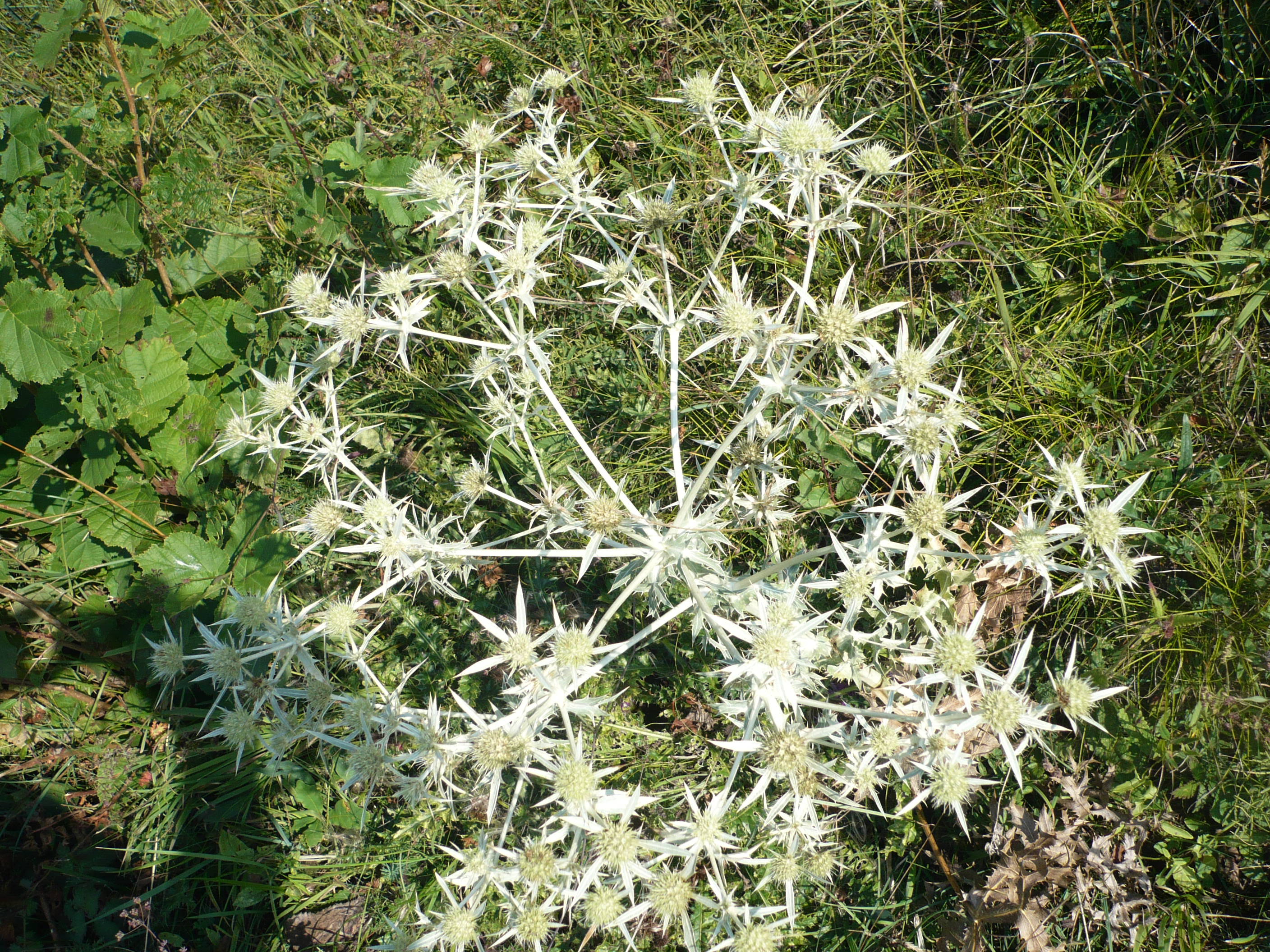 Eryngium campestre